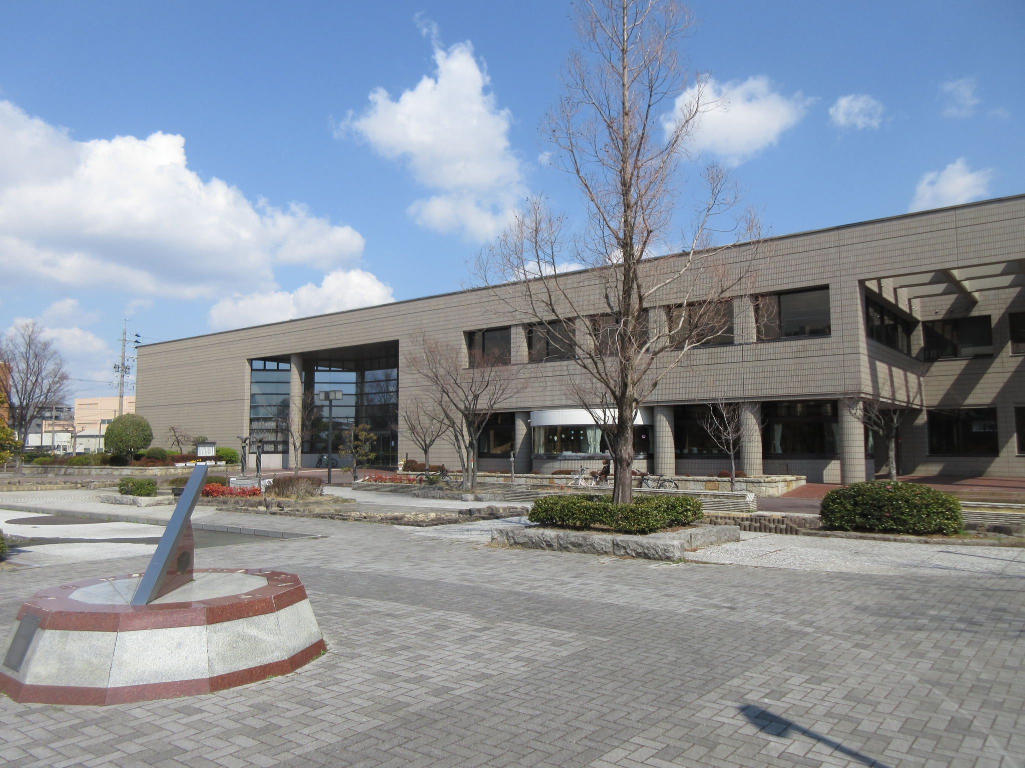 知立市図書館